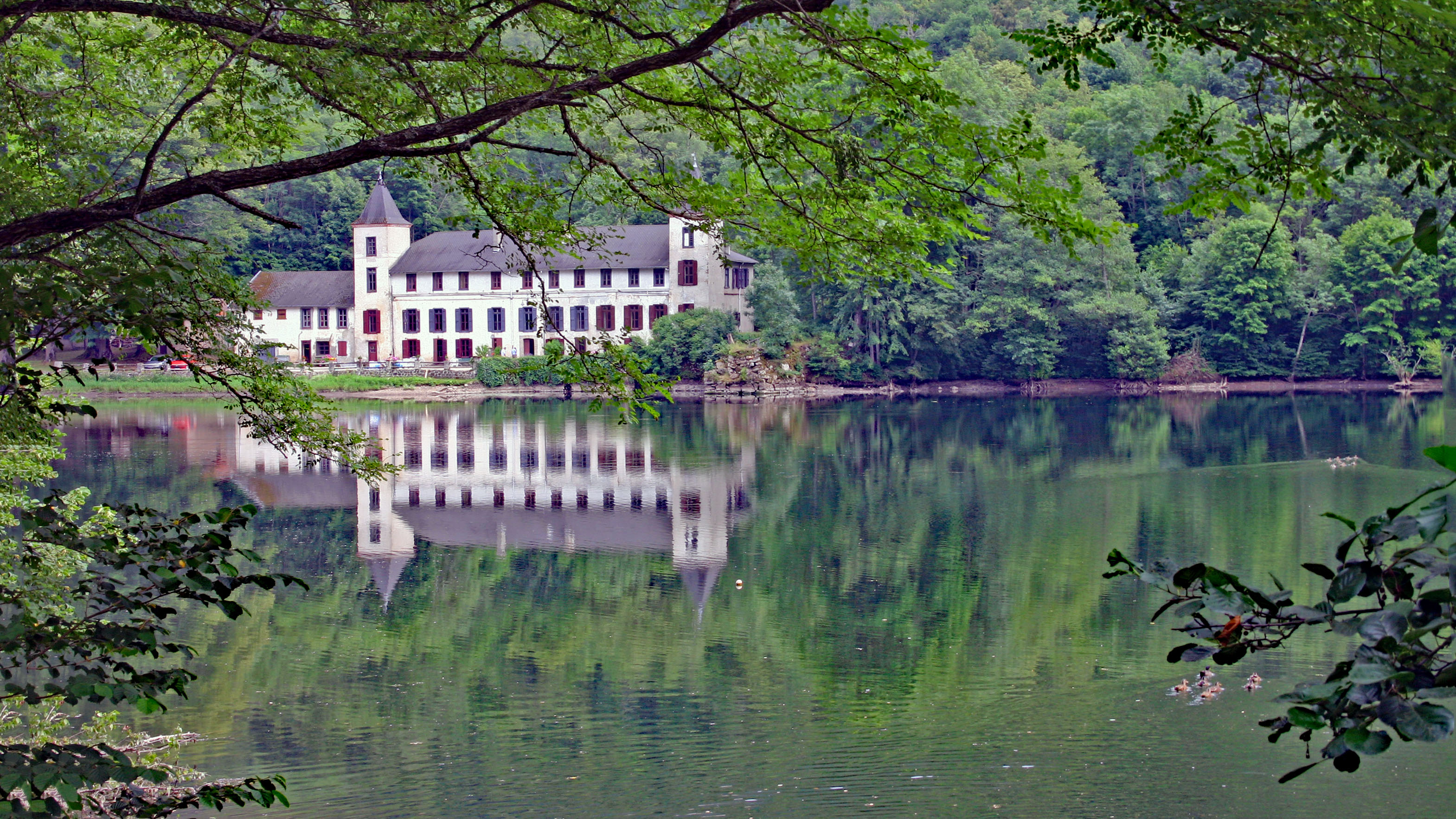 Vu de la route